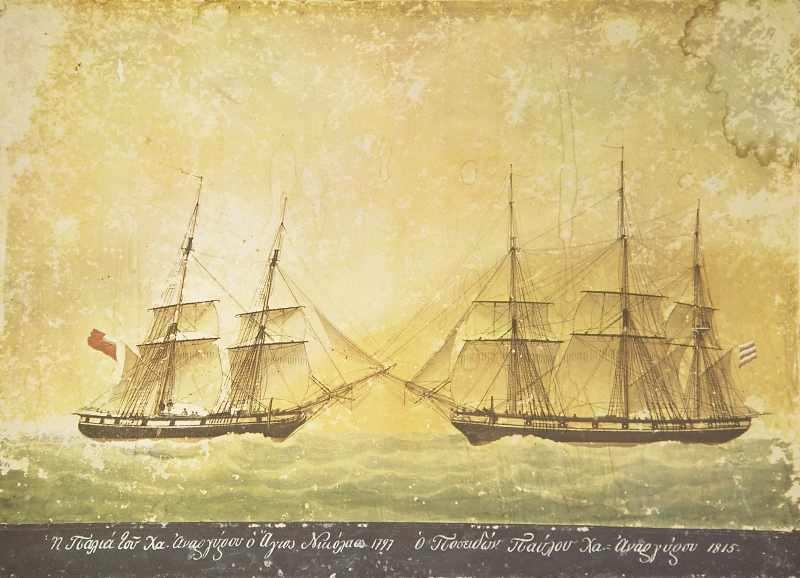 Brick Agios Nikolaos (1797) et navire Poséidon (1815, battant pavillon russe), appartenant aux frères Anargyros de Spetsès